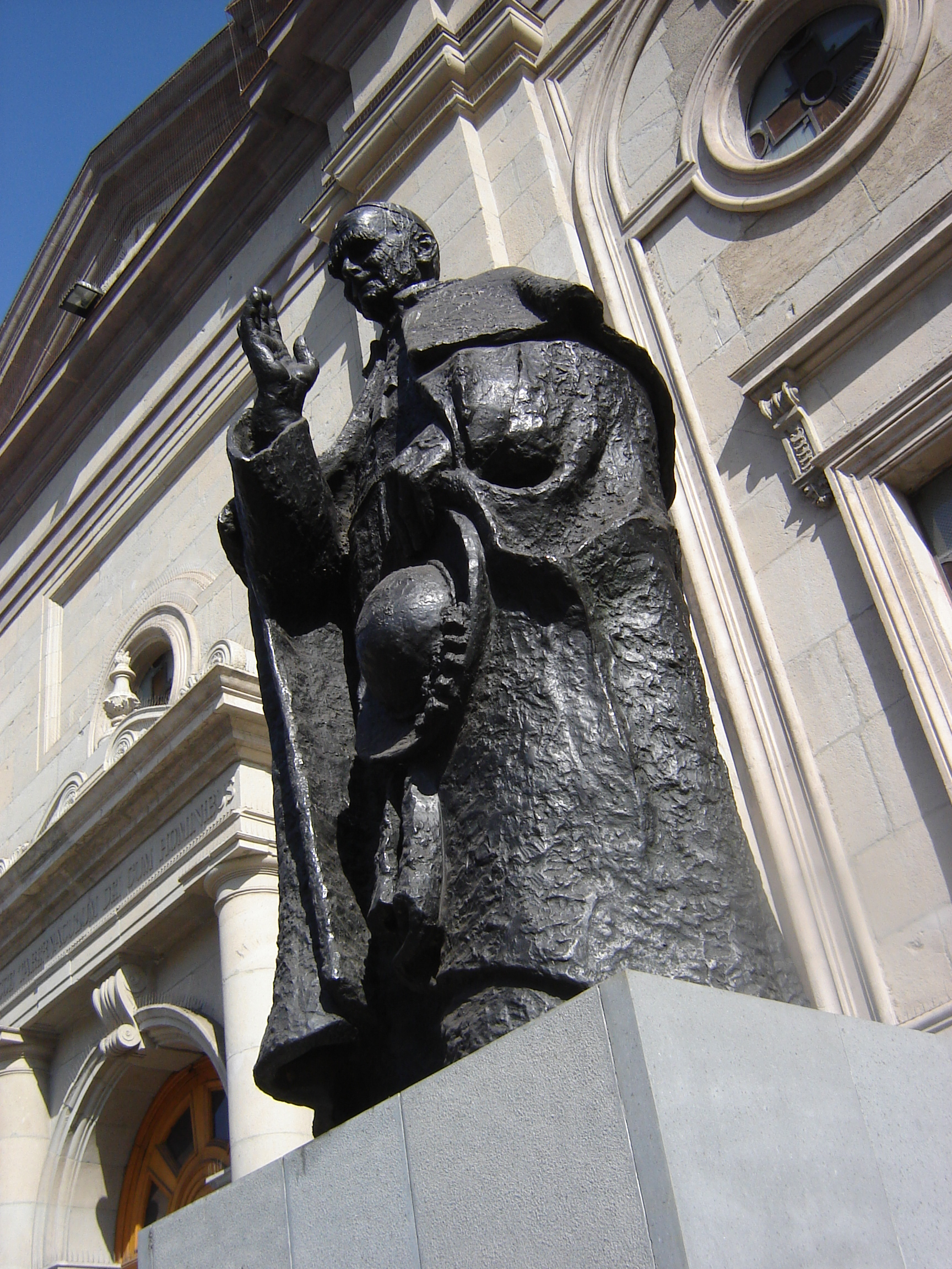 Estatua de José María Caro, obra de Galvarino Ponce en la plaza de Armas de Santiago, Chile